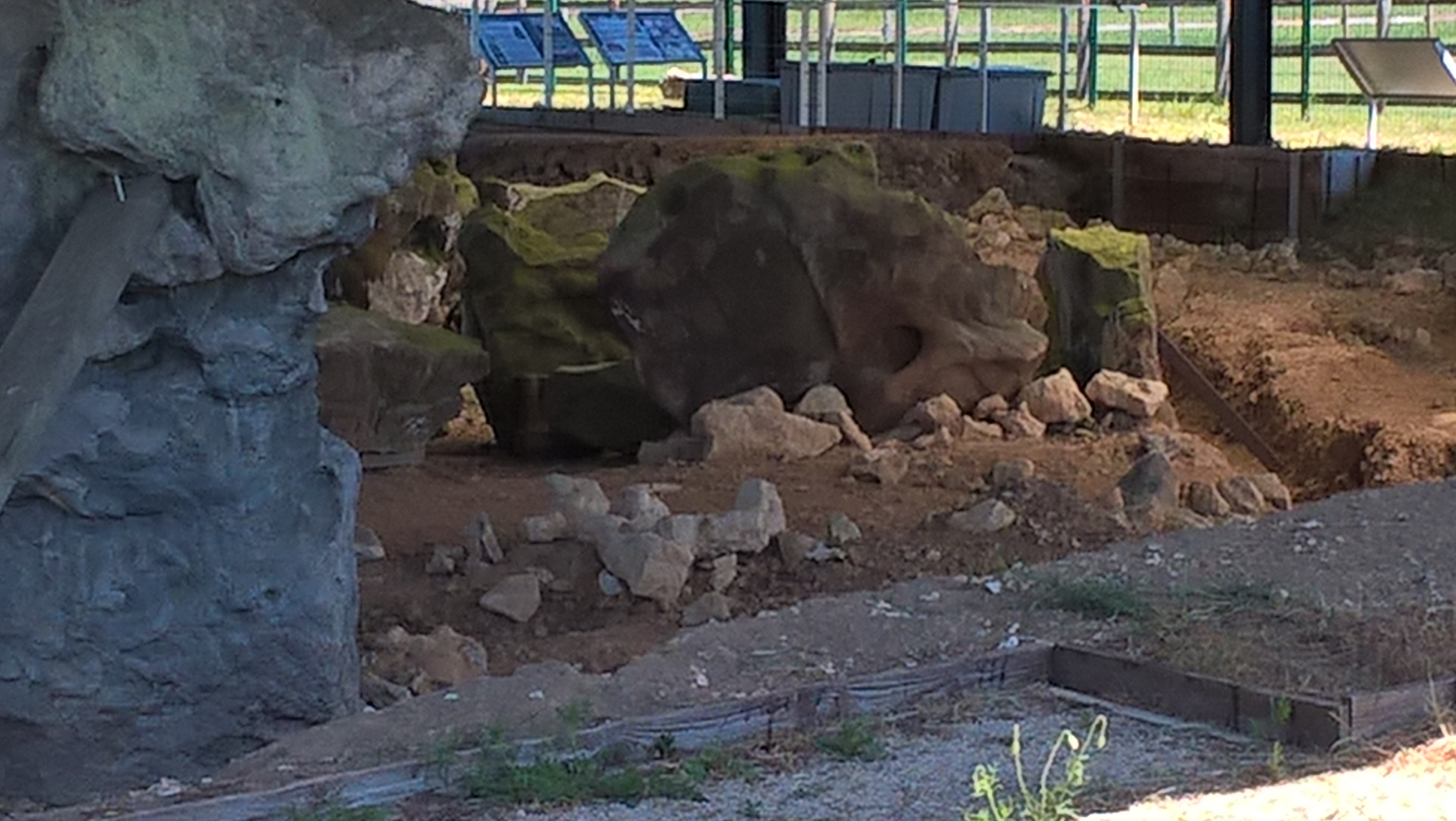 Vue du site mégalithique de Changé